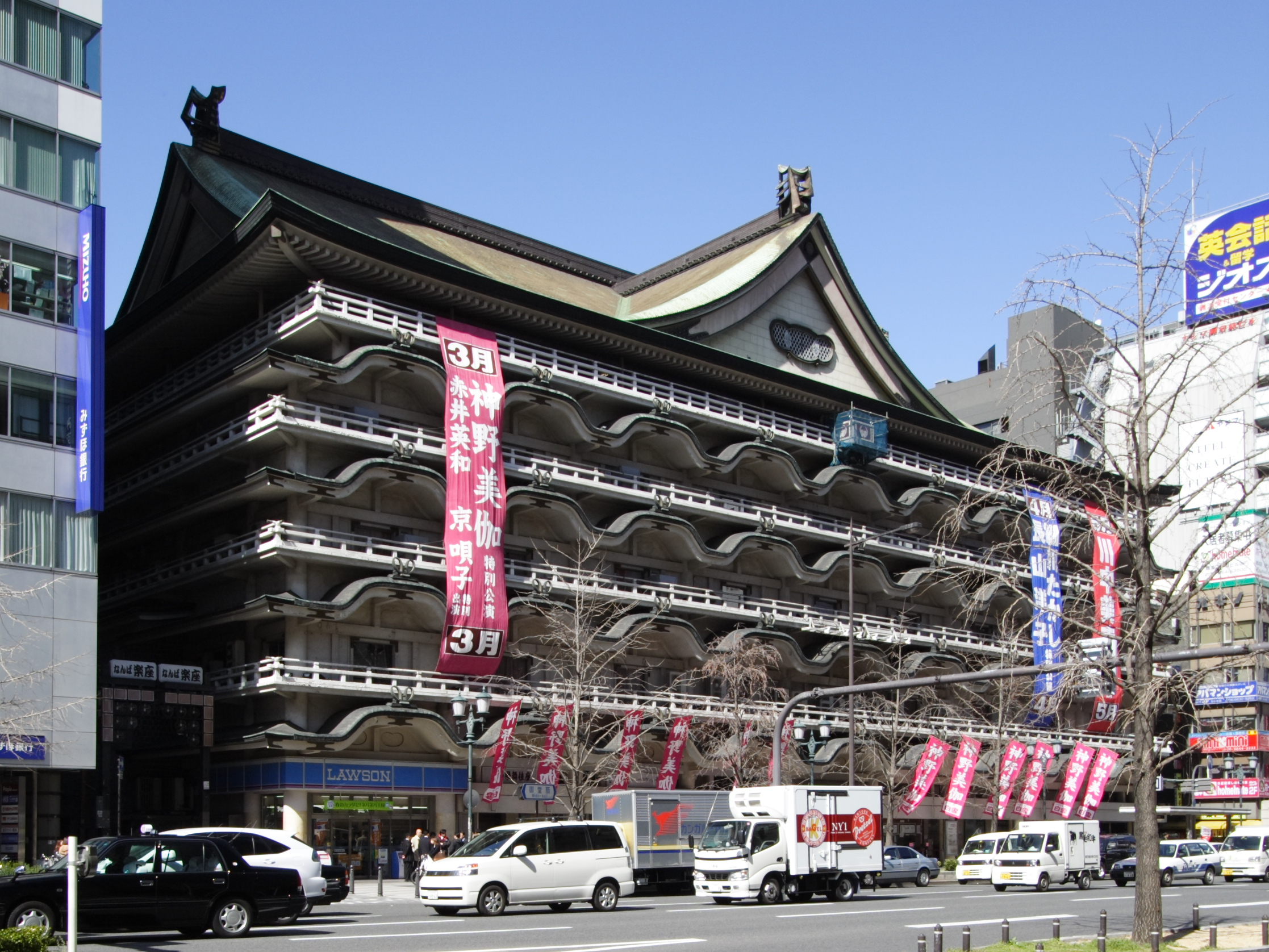 新歌舞伎座(大阪市, 日本)